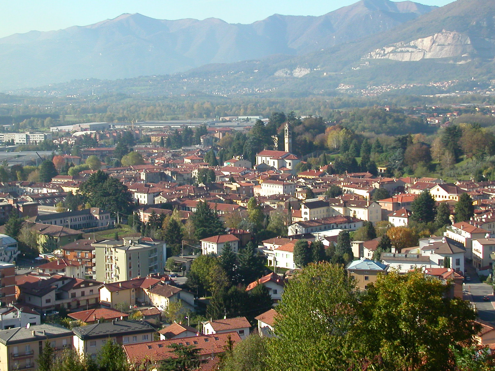 Veduta del centro abitato dalla frazione Molera